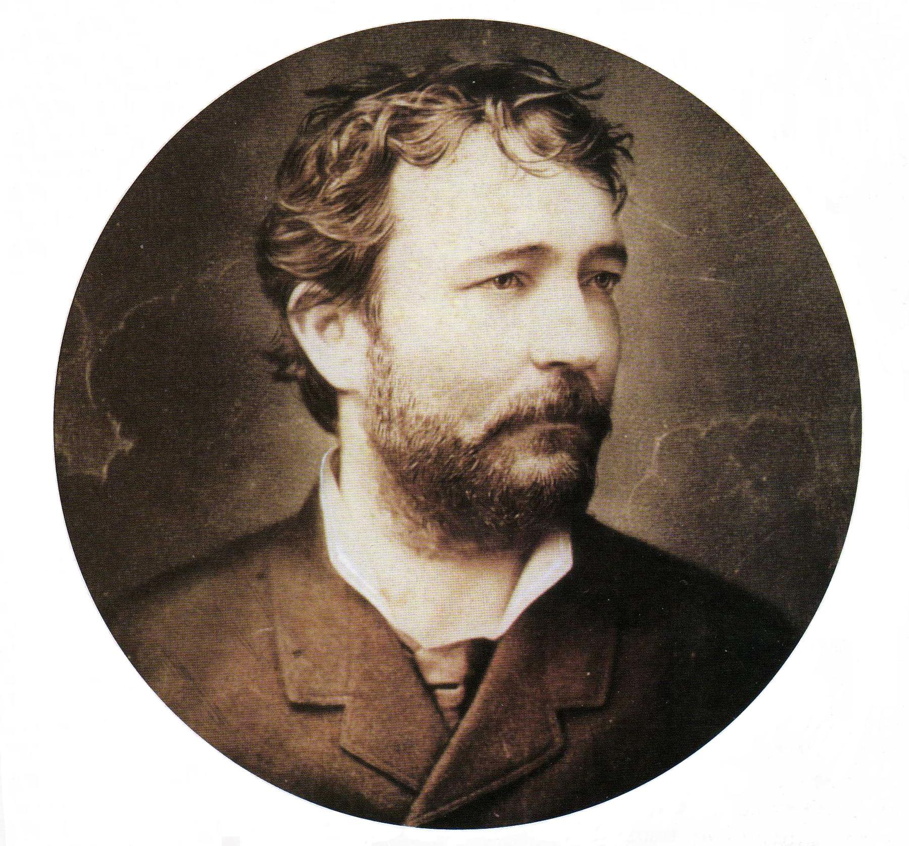 Il tenore Angelo Masini (1844-1926), ritratto di Romolo Liverani (Faenza, 12 settembre 1809 – Faenza, 9 ottobre 1872)